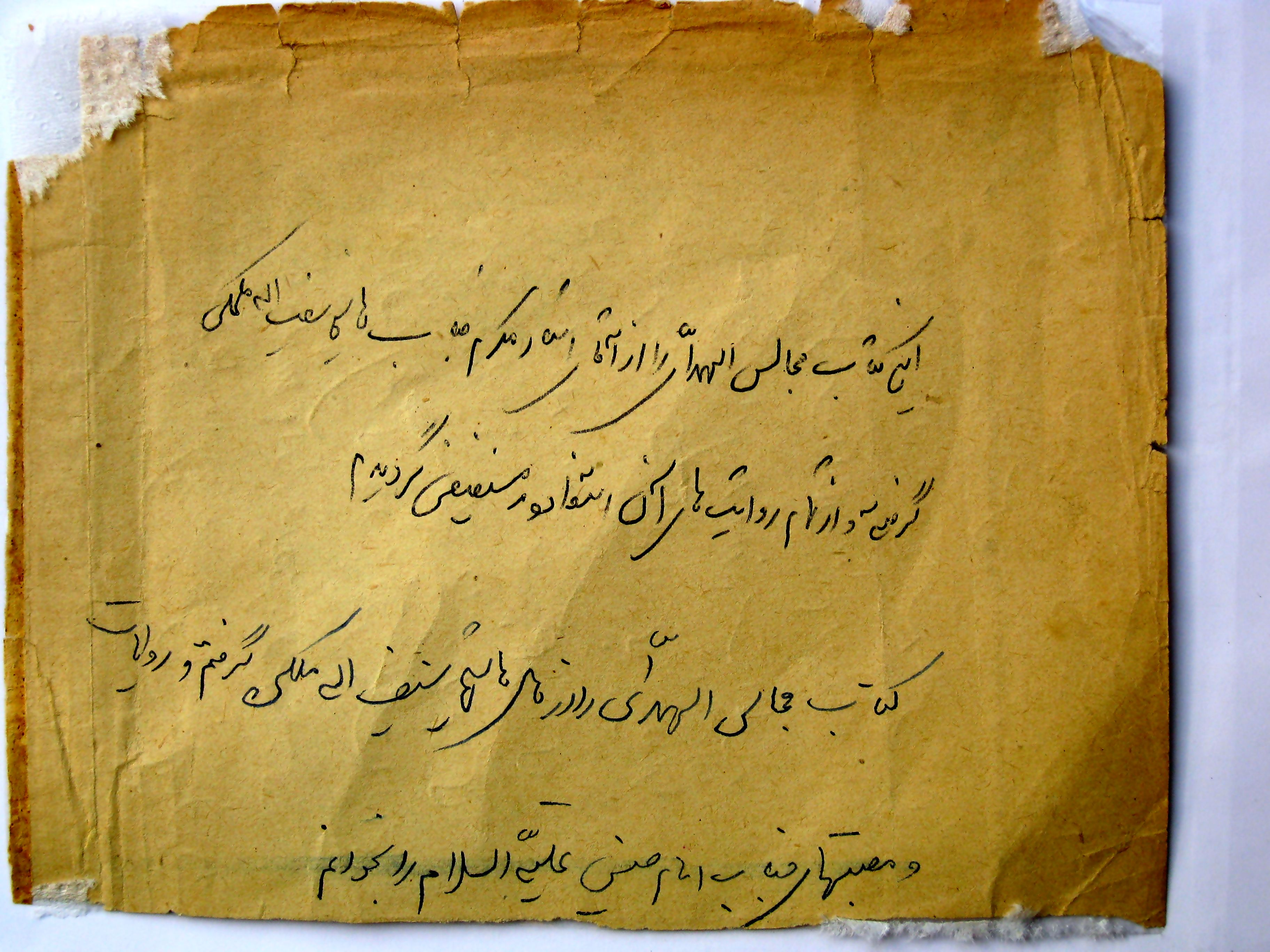 یک متن کهنه مربوط به محرران بهاری‌